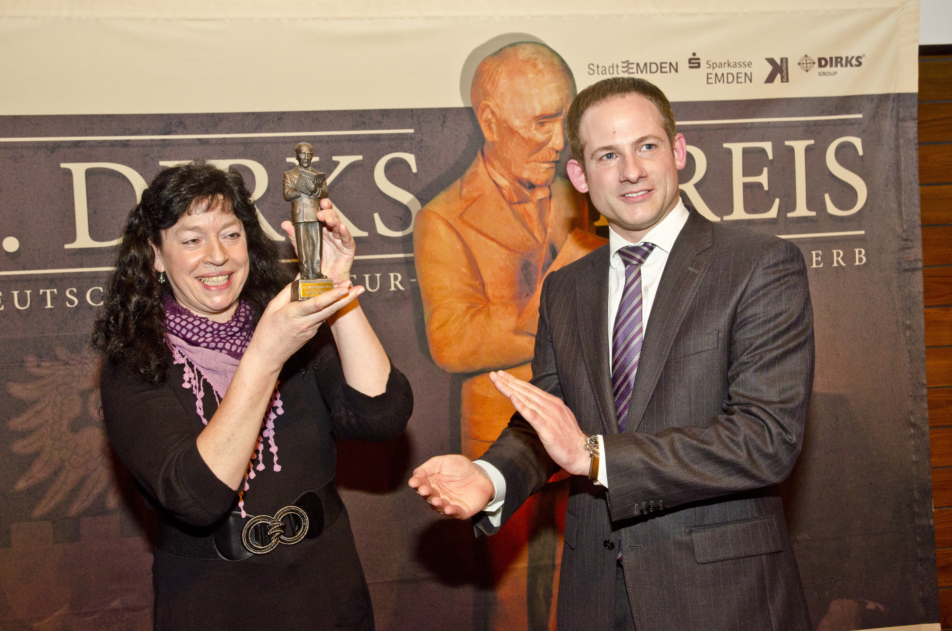 Urenkel Marcus Dirks, Geschäftsführer der Dirks Group, die den Preis stiftet, überreicht die Skulptur an Gitta Franken